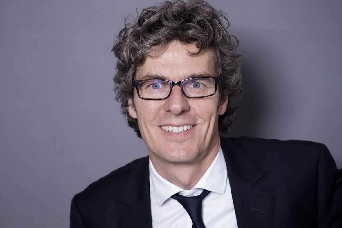 Jan Evers